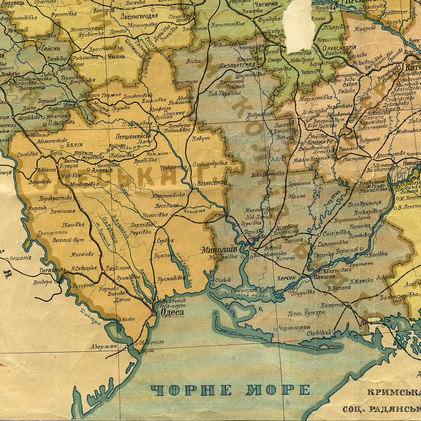 Одеська та Миколаївська губернії, фрагмент мапи Української соц. рад. республіки, січень 1922